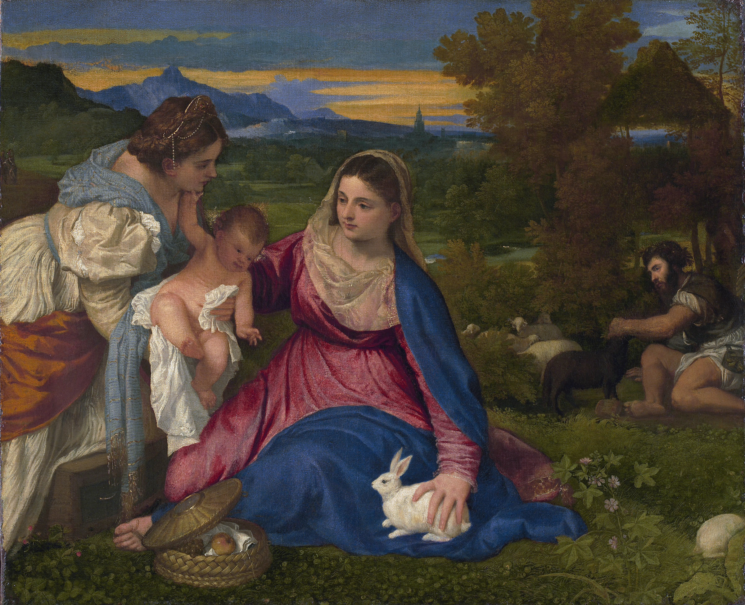 La Vierge au Lapin à la Loupe